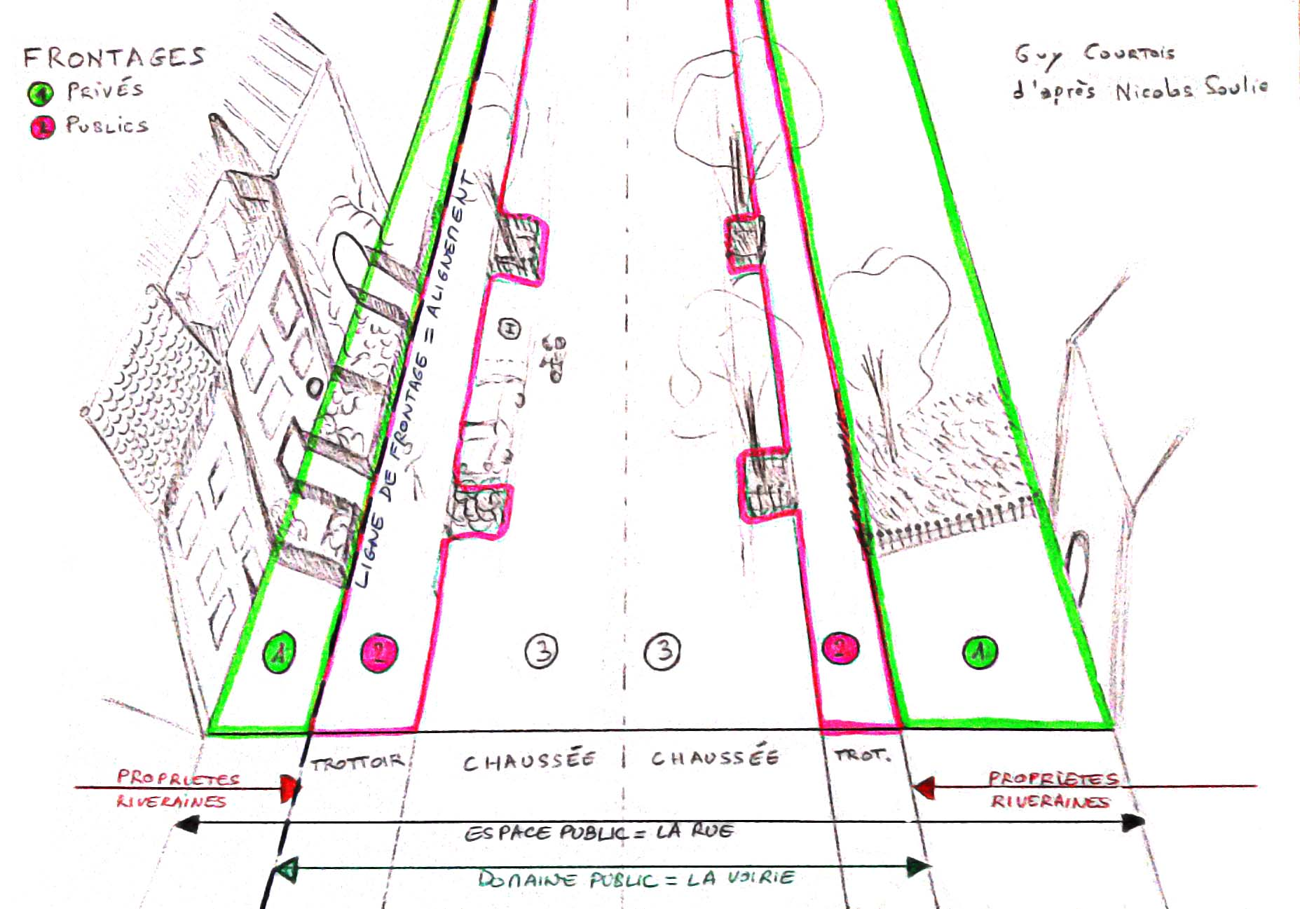 Dessin personnel inspiré de Nicolas Soulier Un frontage est formé des éléments suivants : Frontage privé : un frontage privé est formé par : - le terrain privé situé entre la limite de propriété et la façade du bâtiment en retrait tournée vers la rue ; - les éléments de cette façade jusqu’à la hauteur du 2e étage ; - les entrées orientées vers la rue ; - une combinaison d’éléments architecturaux tels que clôtures, perrons, vérandas et galeries d’entrée … Ces éléments ont une influence sur les conduites sociales dans l’espace public. Frontage public : un frontage public est la surface du domaine public de voirie comprise entre le caniveau de la chaussée et la limite du trottoir côté riverains. Il comprend le trottoir, les arbres de rue, les lampadaires, les mobiliers urbains, et éventuellement des bandes de terrain plantées. Le frontage public est cette partie cruciale de la rue, où les piétons circulent et accèdent aux propriétés et aux bâtiments riverains ; ils constituent un des principaux éléments de l’espace public ; c’est là que les gens se mêlent les uns aux autres, conversent, jouent, mangent… C’est une composante importante non seulement du système de déplacement, mais aussi du tissu social. Ligne de frontage : la ligne de frontage est la limite d’une propriété privée qui la sépare du domaine public de voirie. (Nous l’appelons en France « l’alignement ».) — Nicolas Soulier, Extrait du livre Reconquérir les rues, 2012